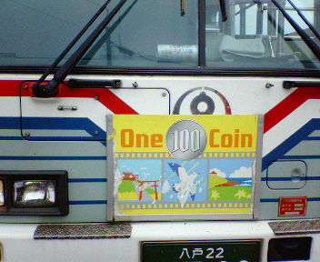 八戸市営バス・ワンコインバス・うみねこ号サインボード 長年使われているため、差し込み/取り外しの際に傷みが激しい。